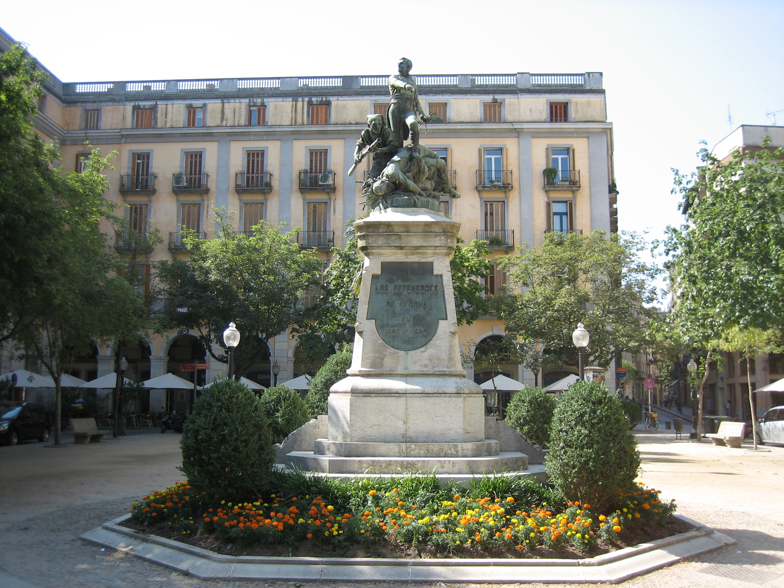 Estàtua dels defensors de Girona del 1808 i 1808 a la Plaça de la Independència de Girona. CT.